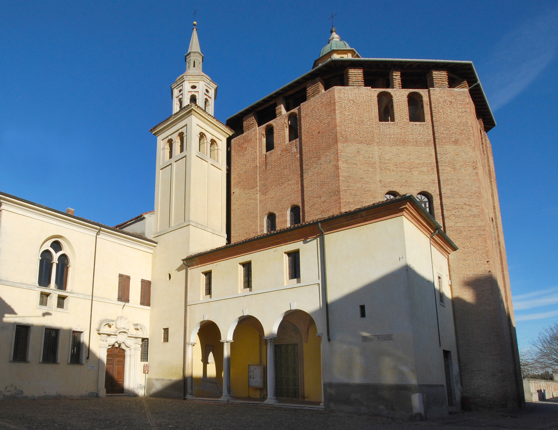 Sabbioneta, chiesa dell'Incoronata.